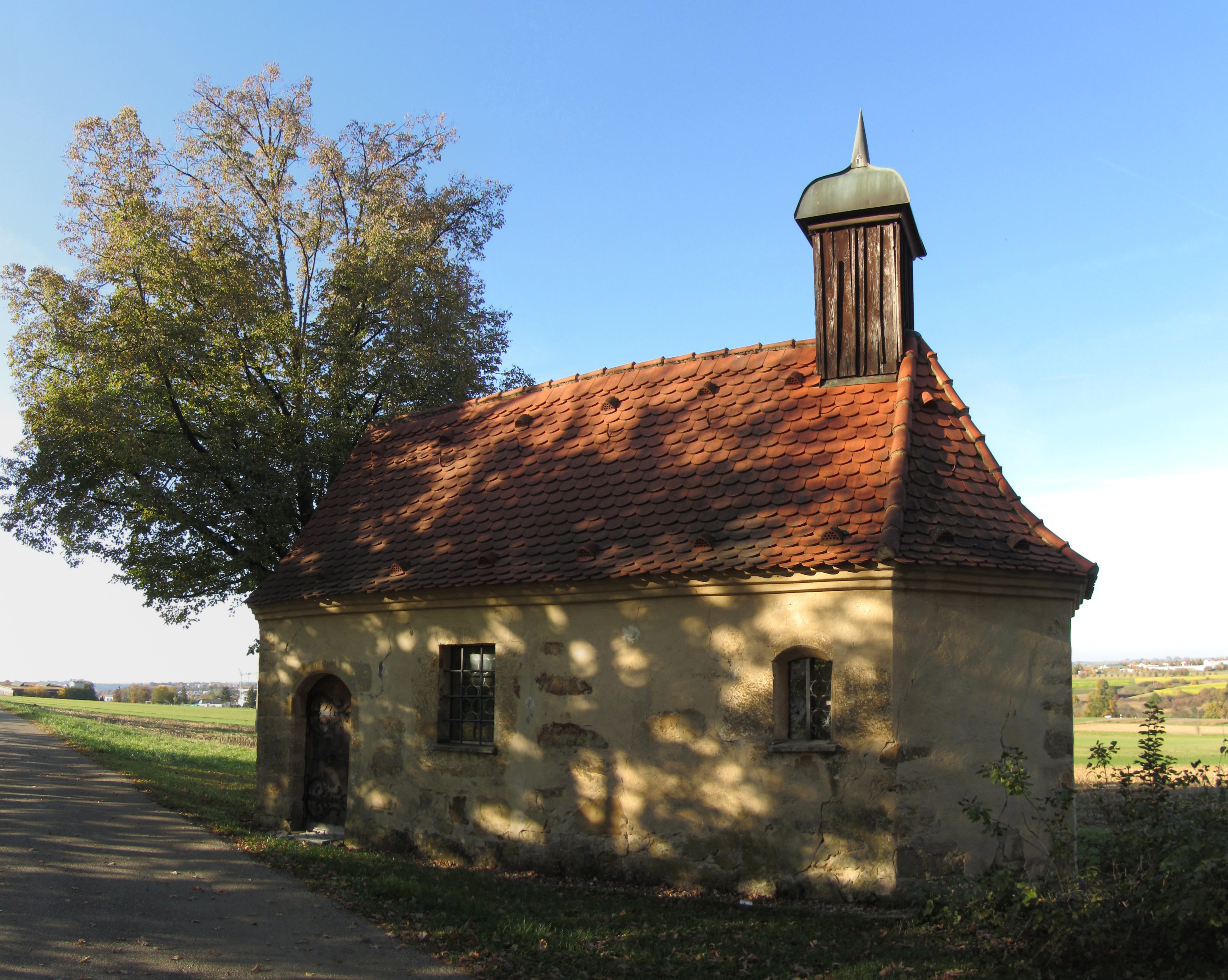 Die Felixkapelle am Bettringer Lindenhof